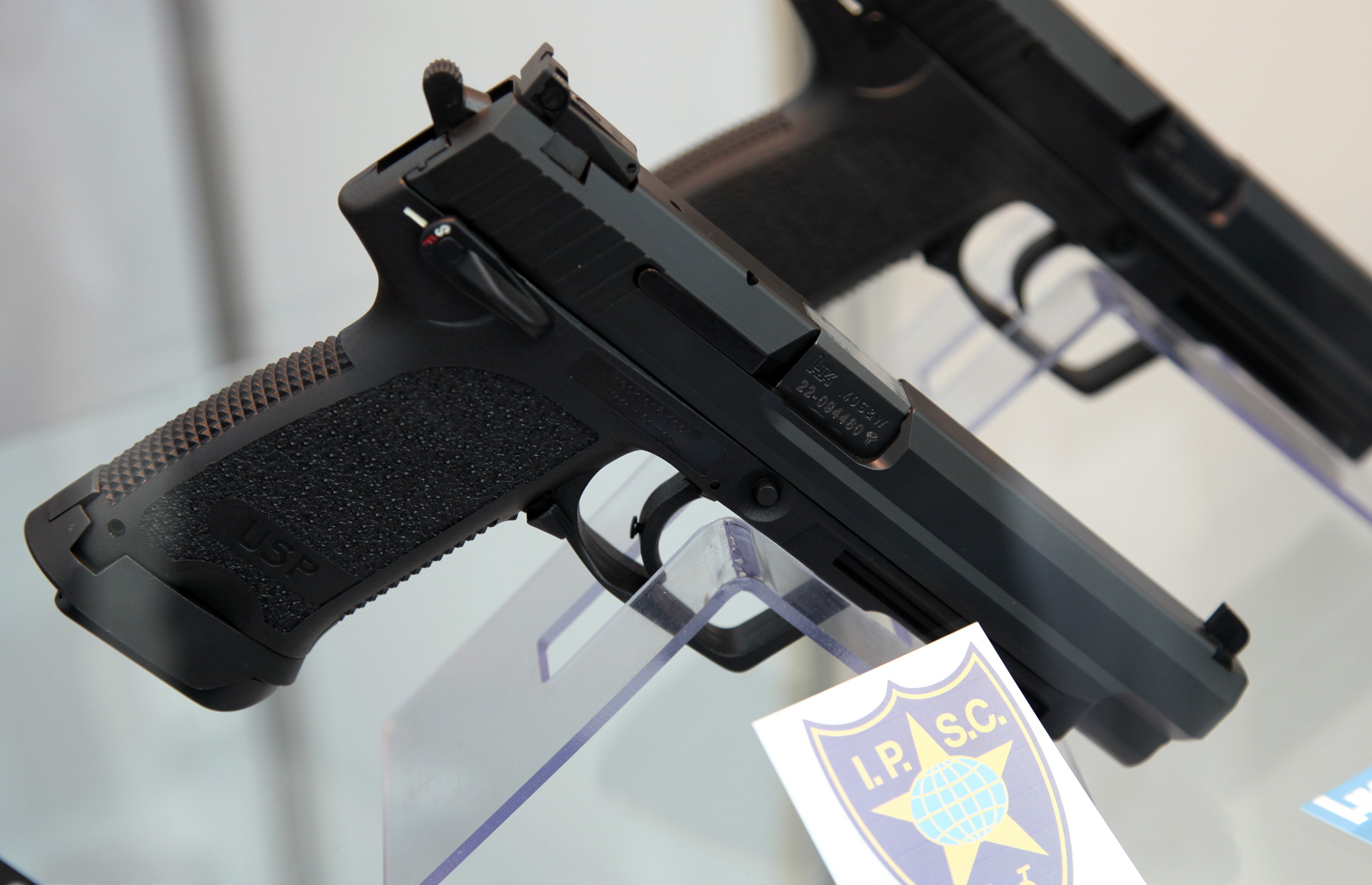 .40 S&W Heckler & Koch USP Expert